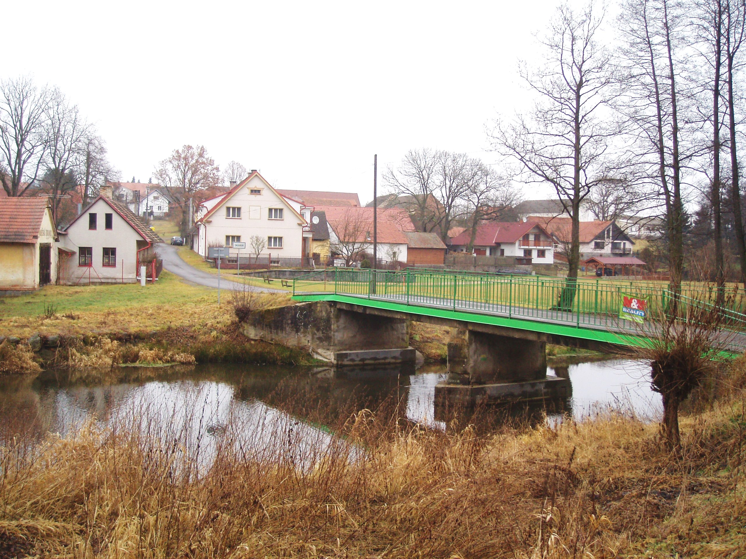 Skuhrov - vesnice u říčky Vlčavy